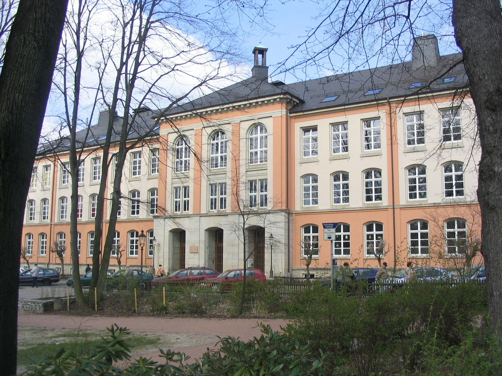 Martin-Andersen-Nexö-Schule in Zschopau, aufgenommen am 10.04.2007 von Dr. Hagen Graebner